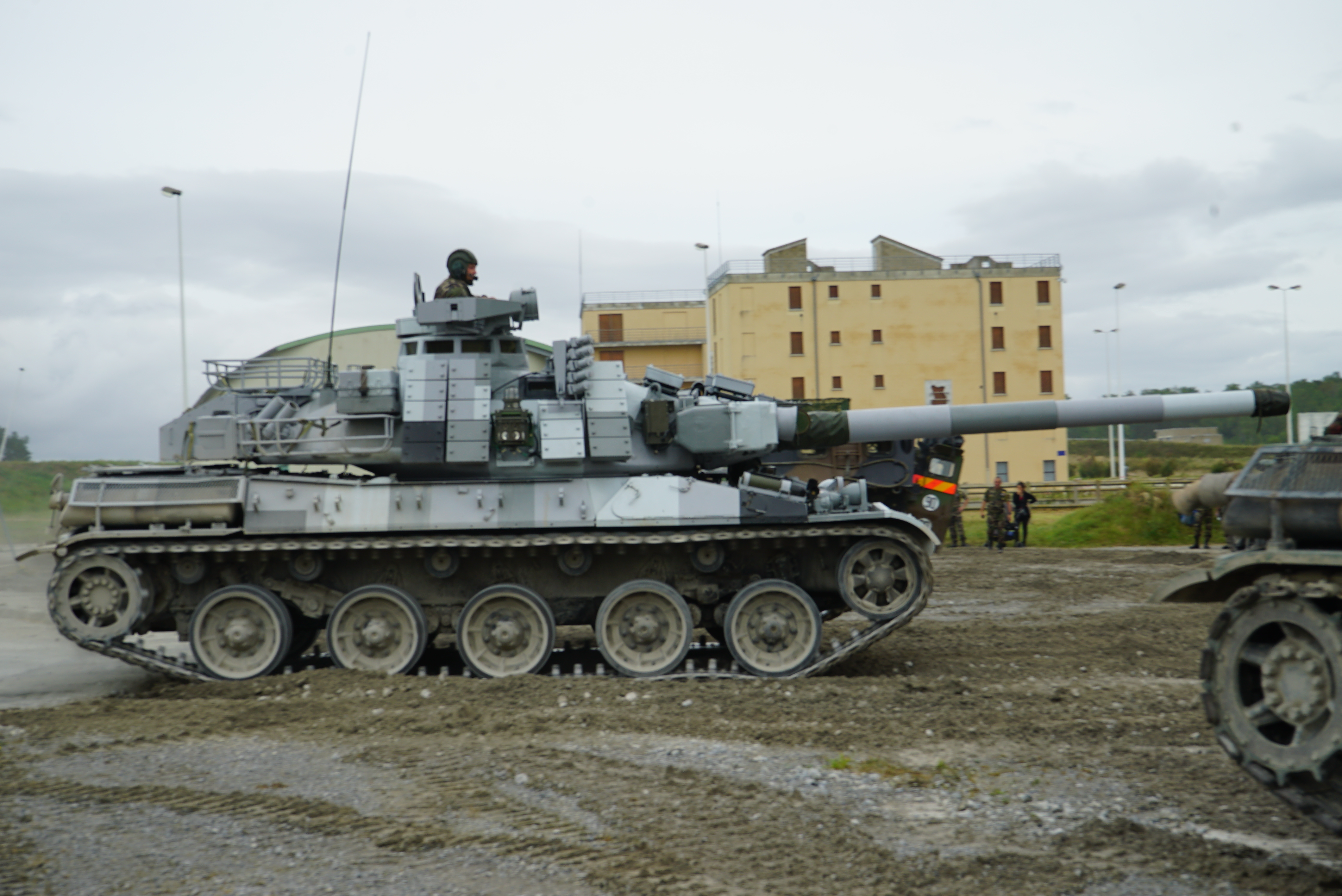 Char AMX-30B en camouflage urbain, dans Jeoffrécourt; journée portes ouvertes en 2016. Les 4 derniers seront retirés du service en 2017/2018.